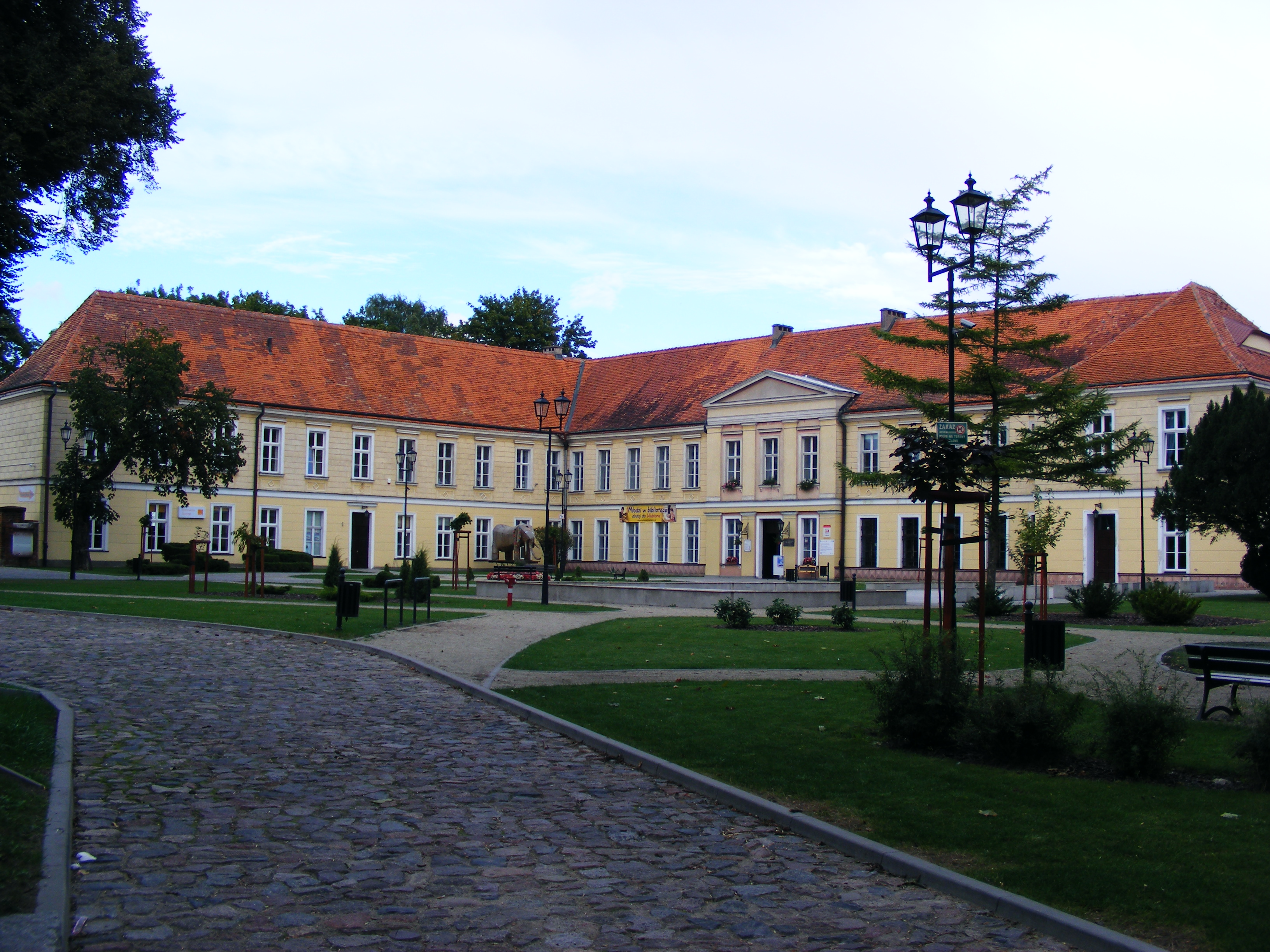 Zamek (Pałac). Trzebiatów, ul. Zjednoczenia 2.